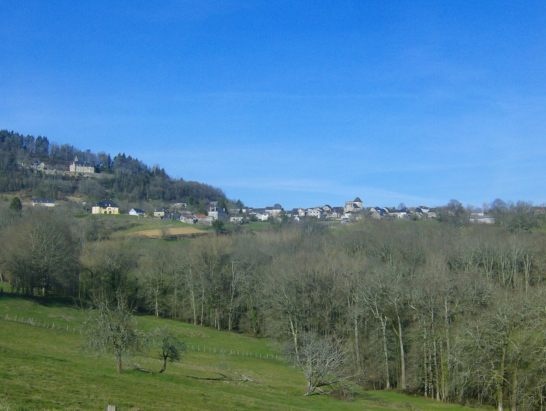 Village de Perpezac-le-Blanc